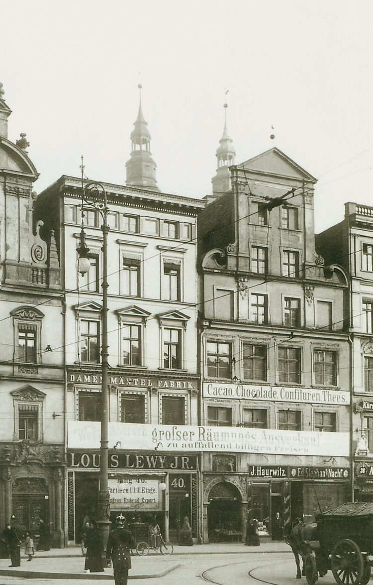 Kamienica 39 i 40 we Wrocławiu, przed 1904 rokiem